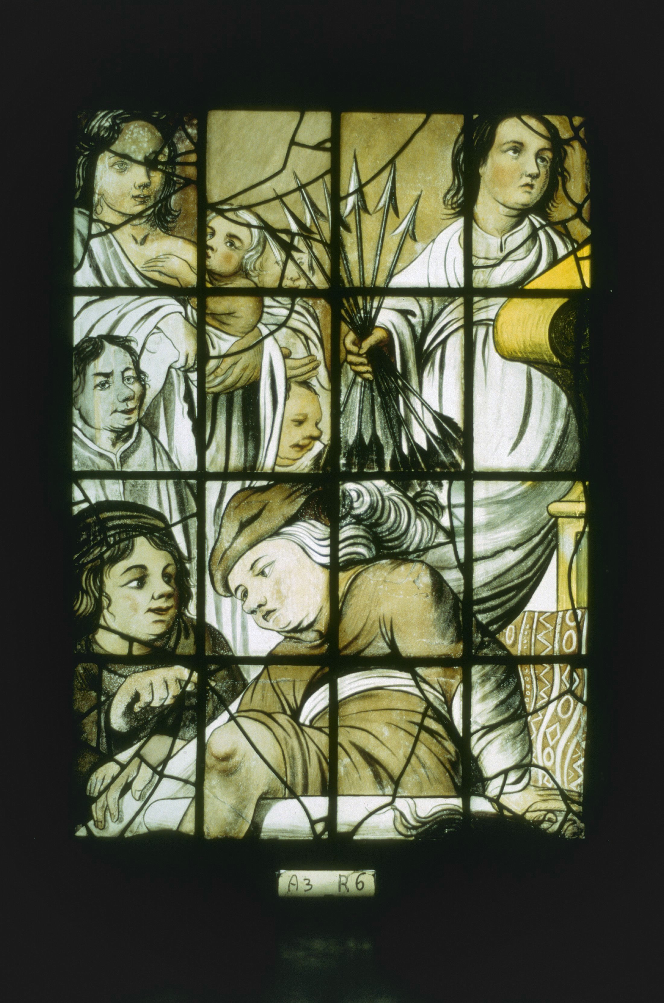 Nederlands Hervormde Kerk: Interieur, gebrandschilderd glas, raam 6: "Vrede van Munster/Wapen ven Westfriese steden", detail A3